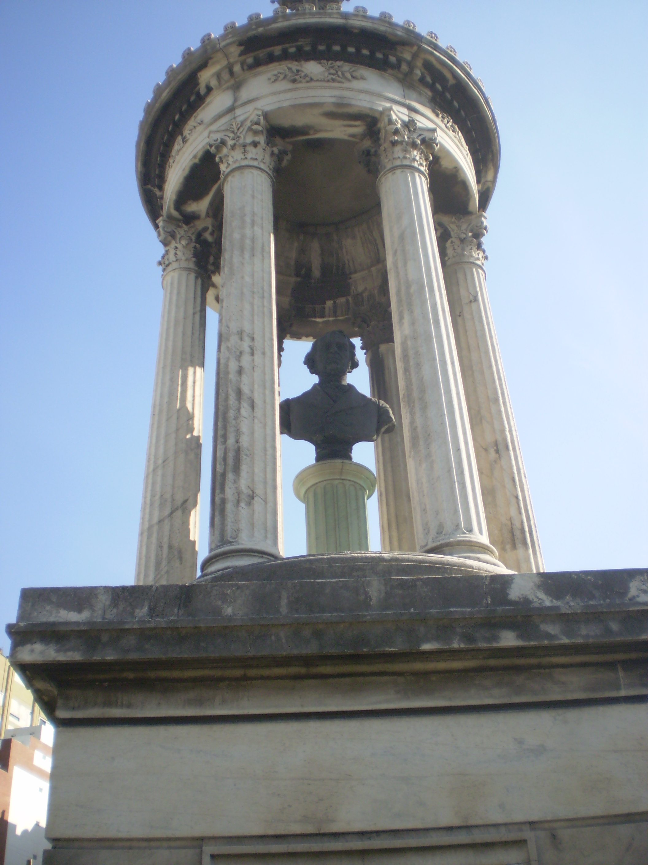 Detalle de la tumba de Dalmacio Vélez Sársfield. Cementerio de la Recoleta. Buenos Aires.